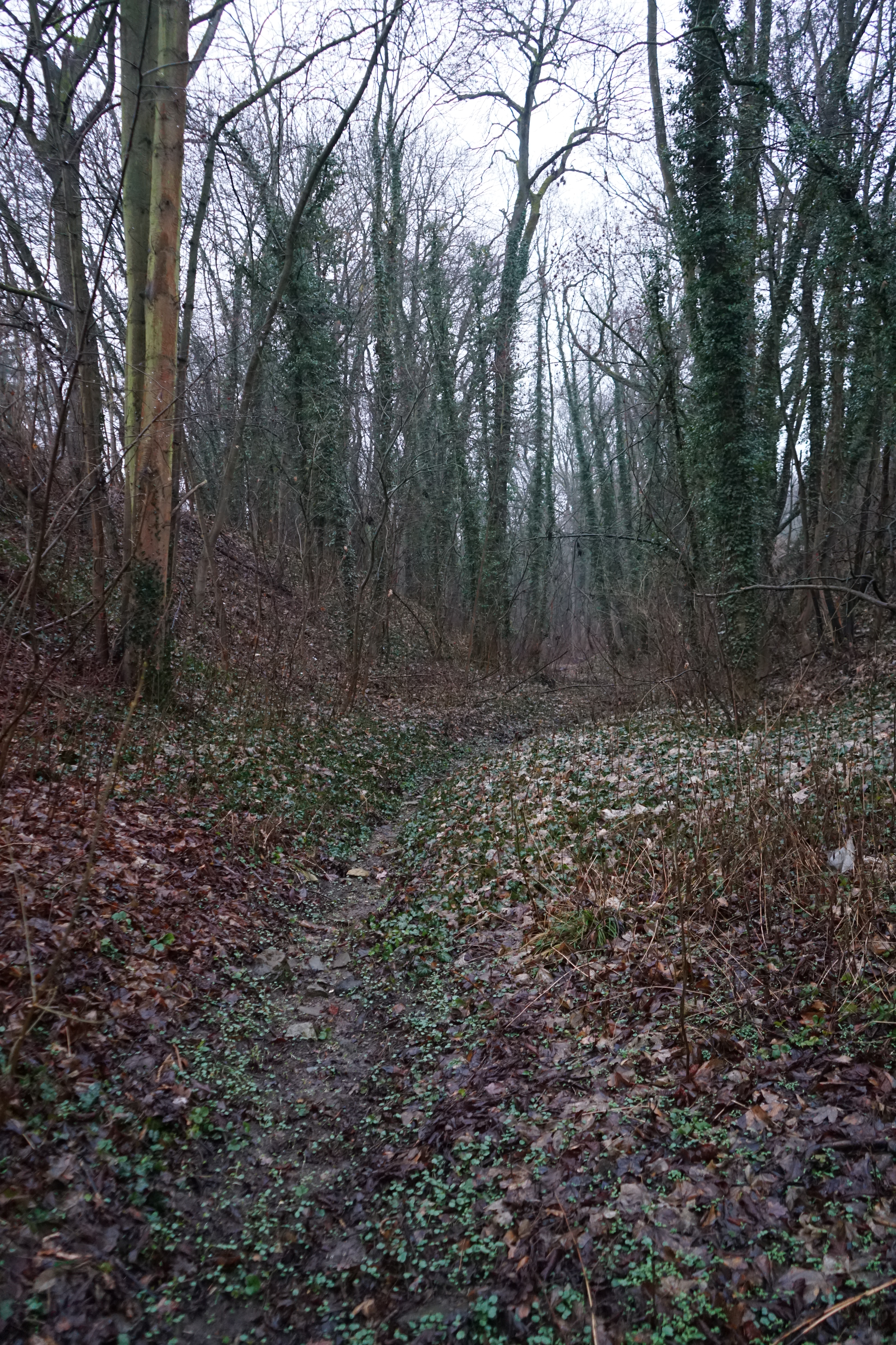 Wilder Graben (Ilm), Blick von der Verdolung Berkaer Straße Ecke Am Wilden Graben flussaufwärts